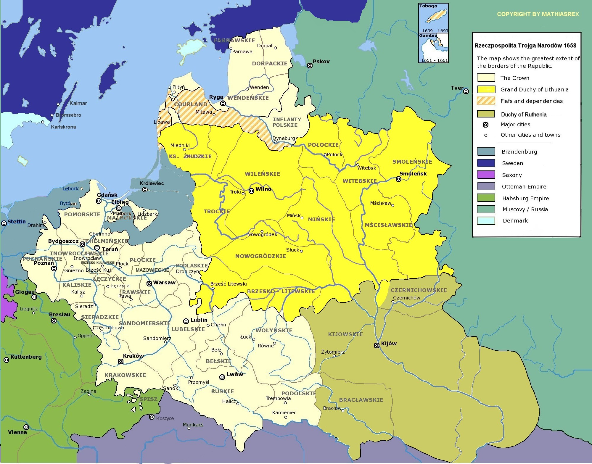 Беларуская (тарашкевіца): Рэч Паспалітая трох народаў (1658)